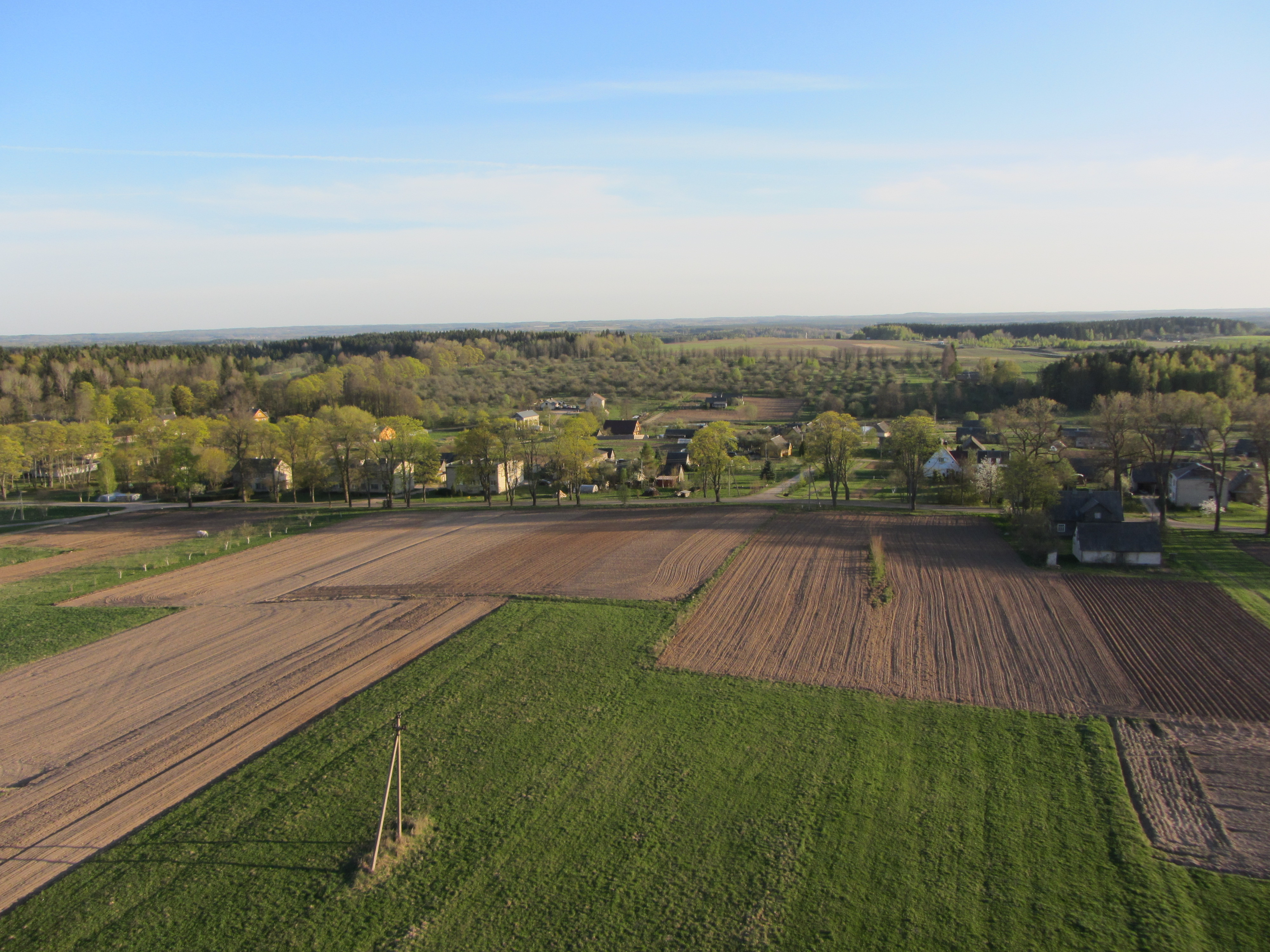 Kazokinė, Lithuania